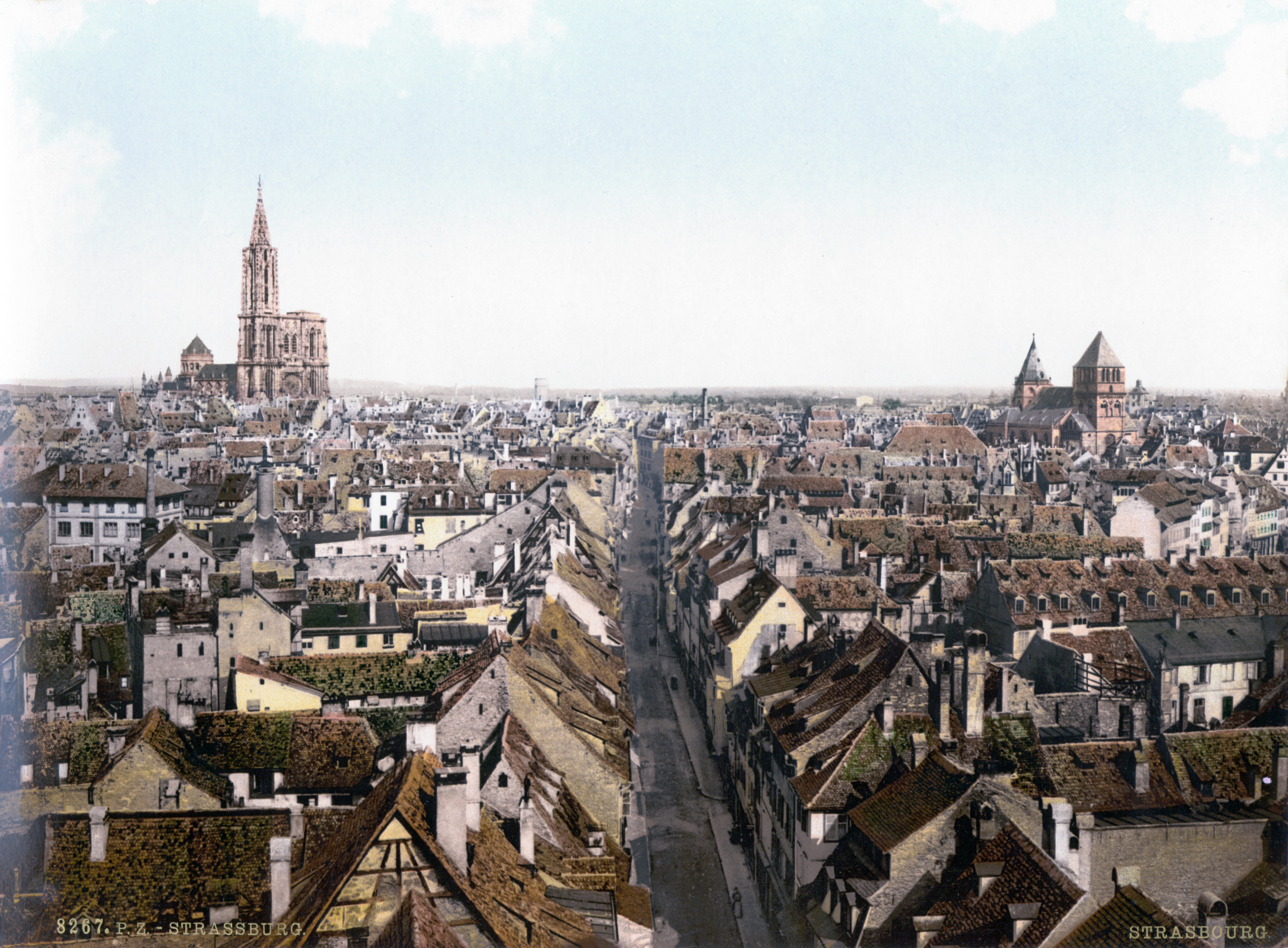 Straßburg ca. 1890-1900